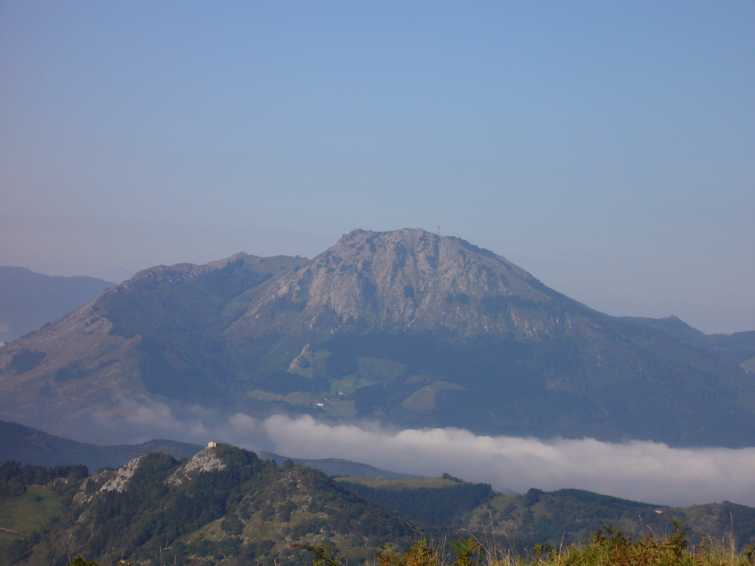 Izarraitz mendiko ikuspegia